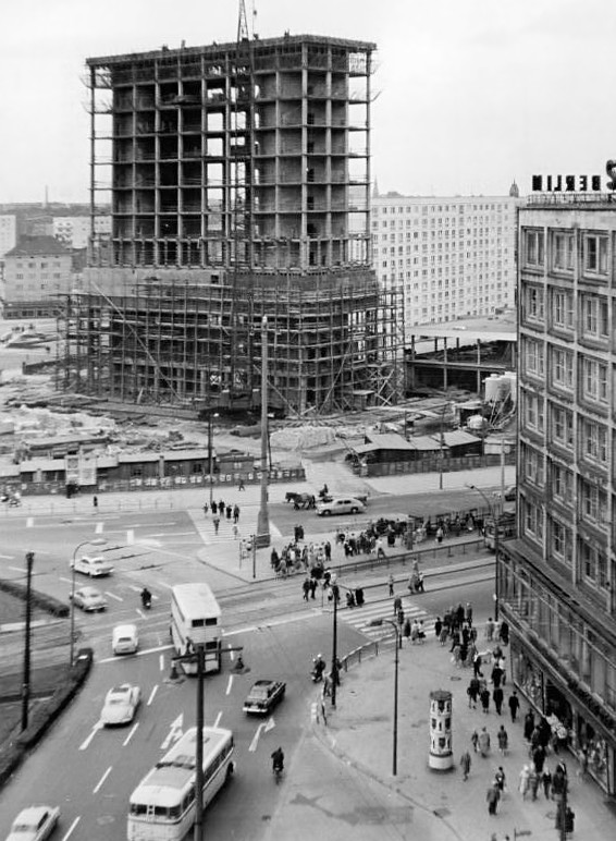 Berlin, Alexanderplatz, Baustelle Zentralbild Studré Me 22.8.63 Berlin - Hauptstadt der DDR Blick auf den Alexanderplatz im Zentrum Berlins. Im Hintergrund die Baustelle des Hauses der Wissenschaftler und der Lehrer.